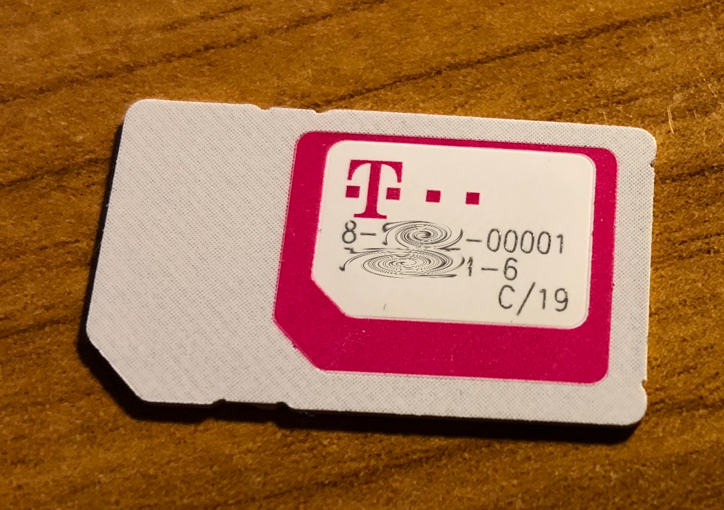 Mini-Sim-Karte der Deutschen Telekom mit vorgestanzter Micro- und Nano-Sim-Karte